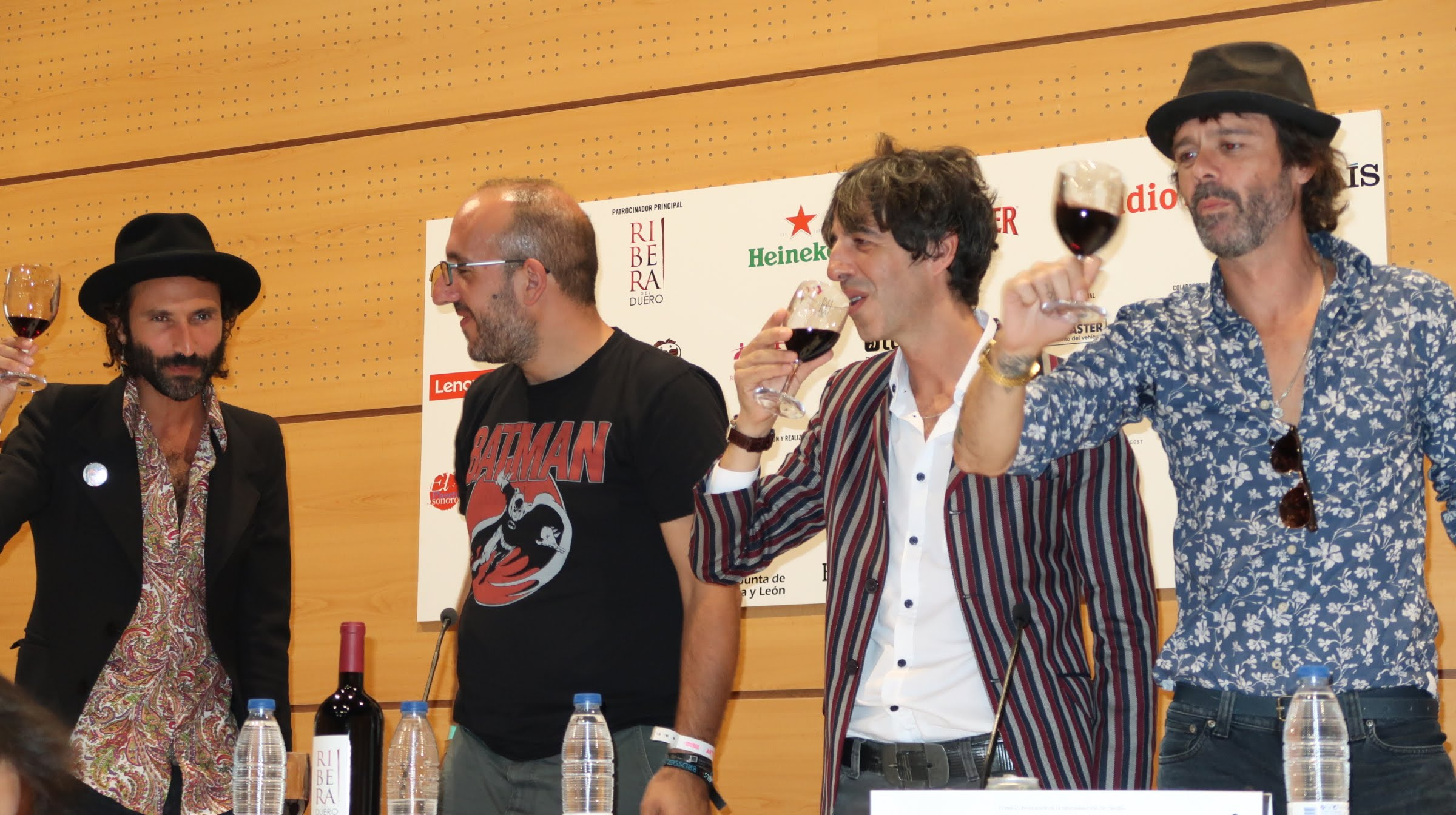 Rueda de Prensa del Festival Sonorama 2017 De izquierda a derecha; el cantante Leiva, Javier Ajenjo, director del festival y Marc Rosa y Jesús Senra, de la banda Sidonie. Aranda de Duero, Burgos, España